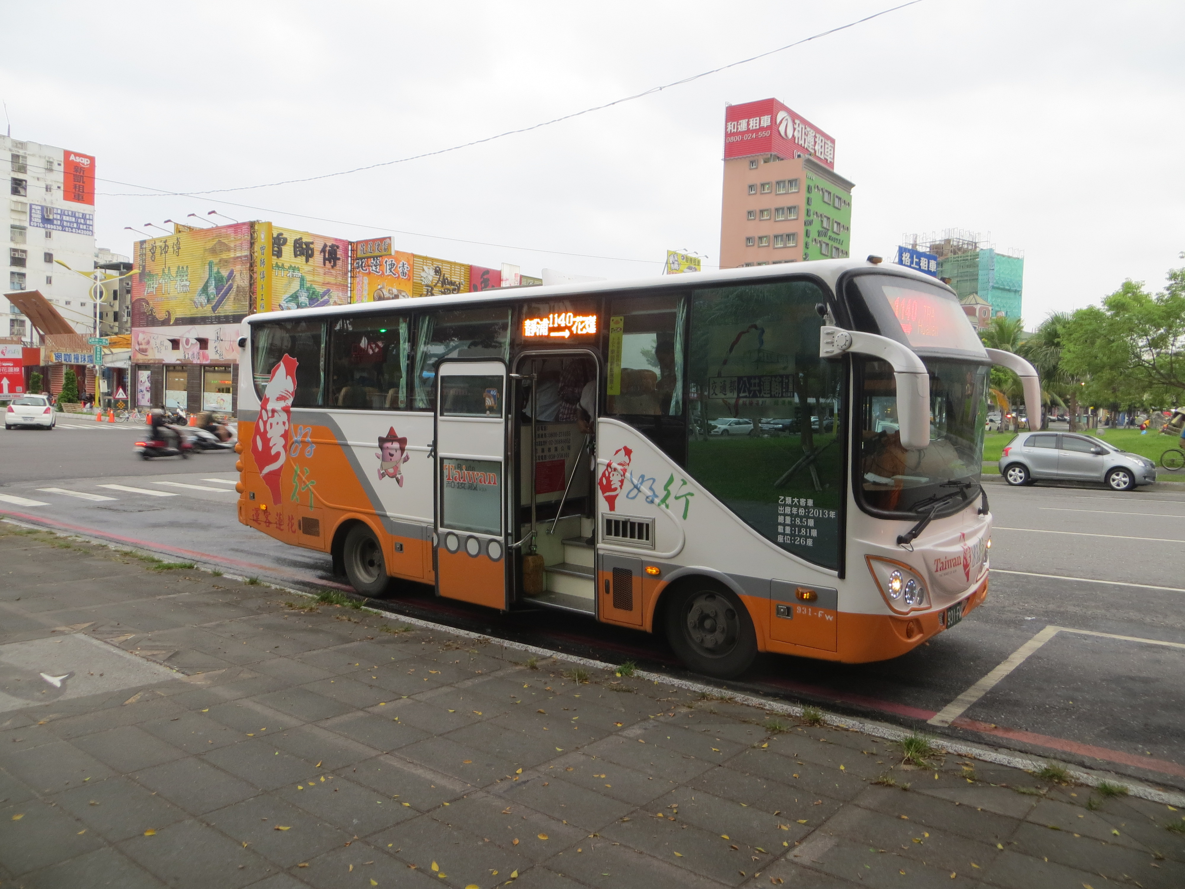 2016年8月29日，14:20自靜浦發車的花蓮客運1140路線，由931-FW負責，過約一小時抵達花蓮客運總站；此為甫抵達花客新總站，照片右側即花蓮火車站前站。